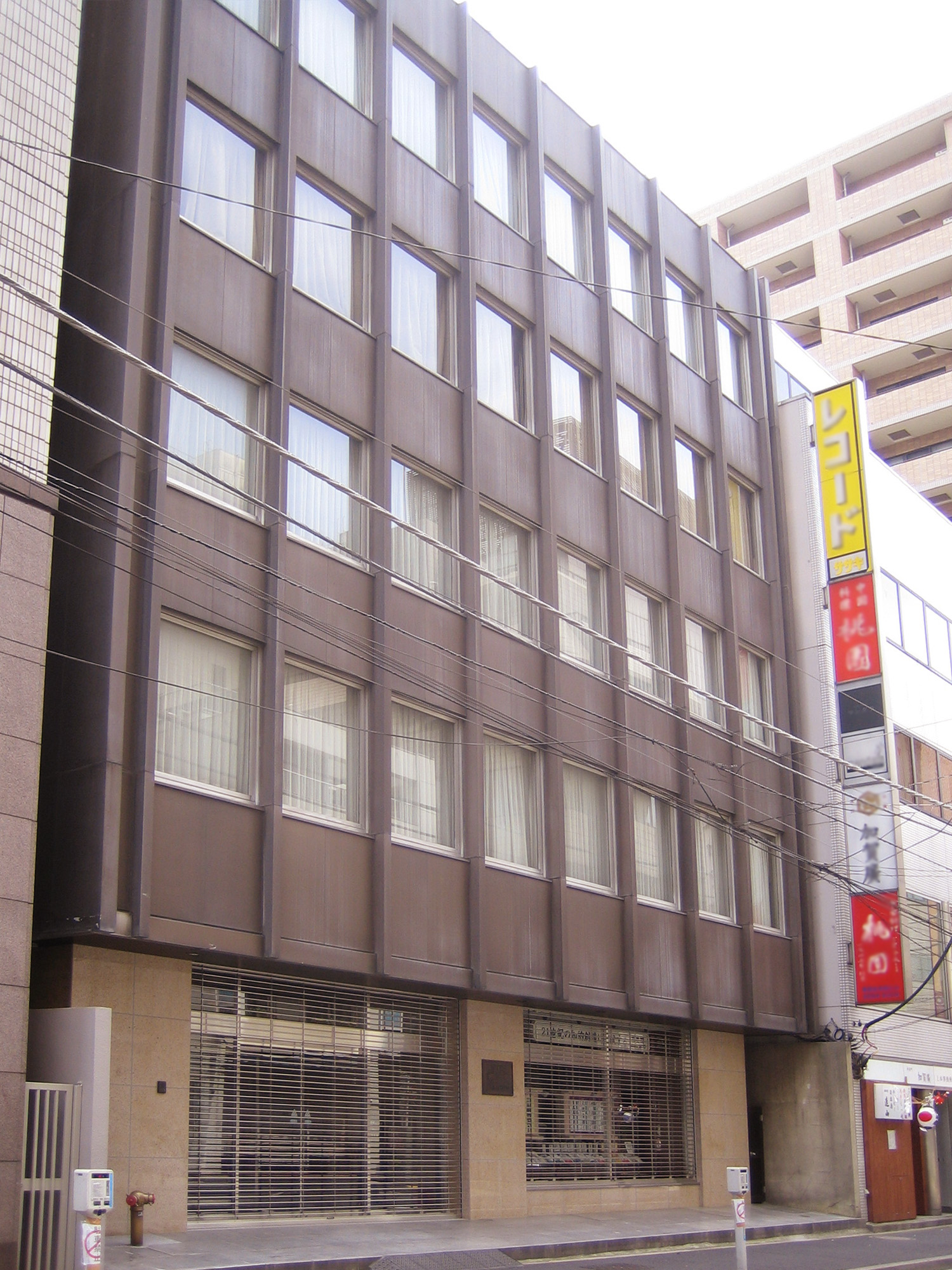 Yuhikaku Publishing Co., Ltd. (有斐閣), Chiyoda, Tokyo, Japan